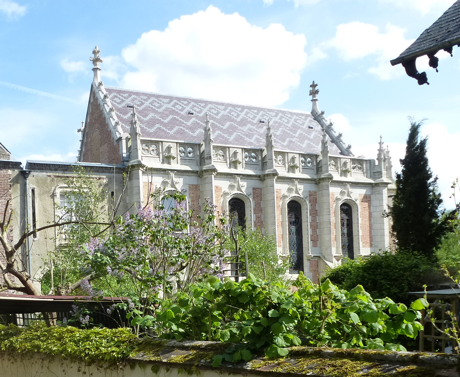 Chapelle du château du Grand Saint-Mars à Chalo-Saint-Mars. (département de l'Essonne, région Île-de-France).